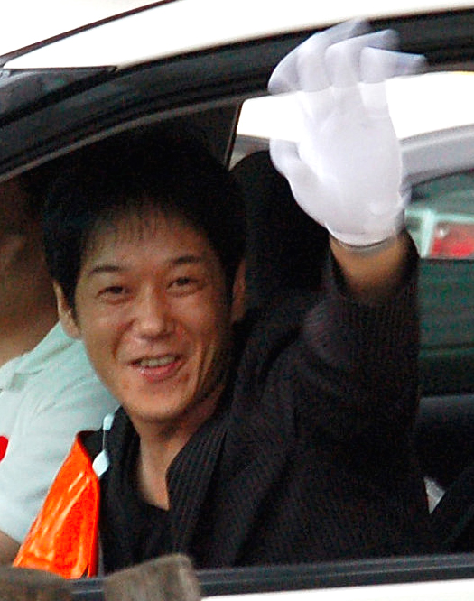 Hiroyuki Yoshiie